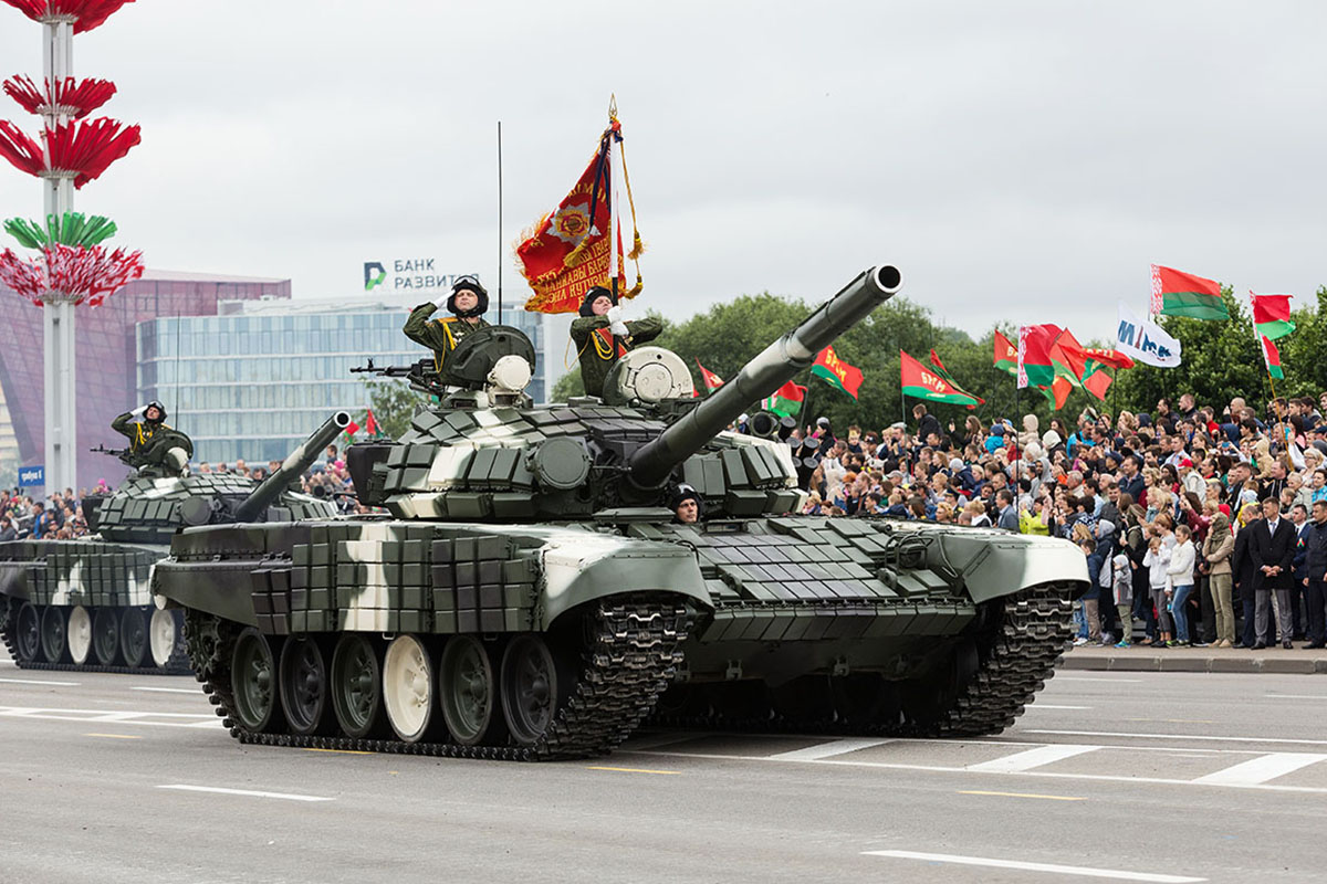 Парад по случаю Дня независимости Белоруссии при участии авиации ЗВО